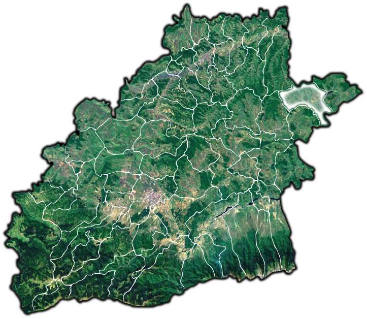 Iacobeni jud Sibiu